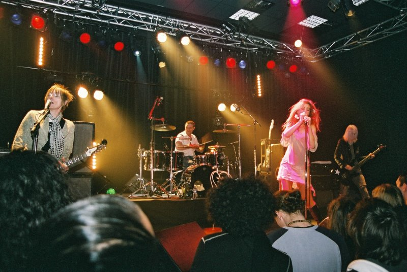 Queen Adreena en concert au Big Band Café, Caen/Hérouville Saint-Clair